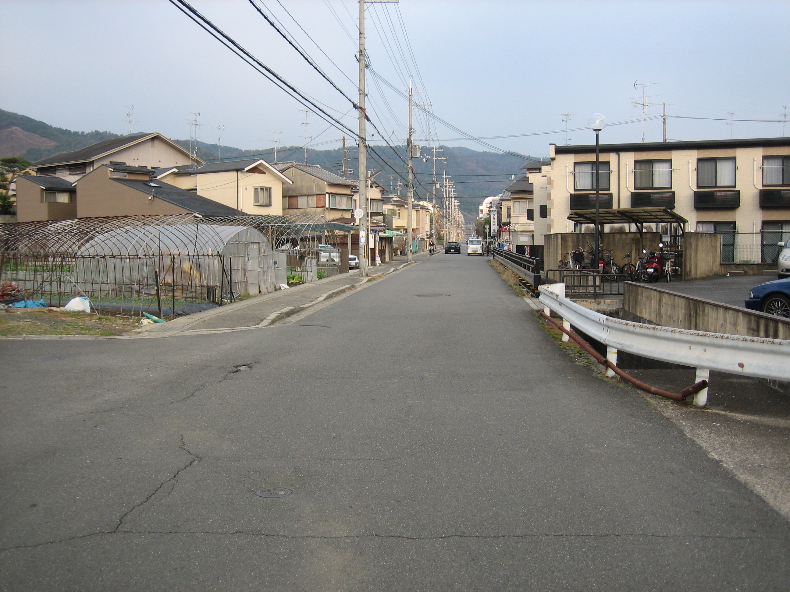 大徳寺通を京都市北区西賀茂鹿ノ下町で撮影